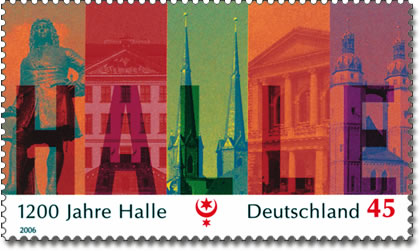 1200 Jahre Halle (Saale)